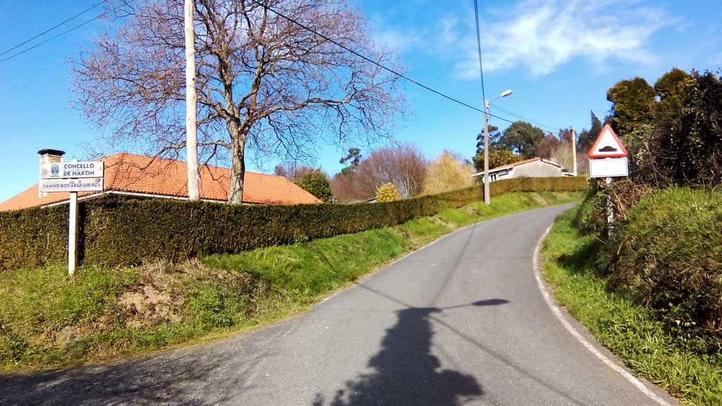 Vista da Fraga, Narón.